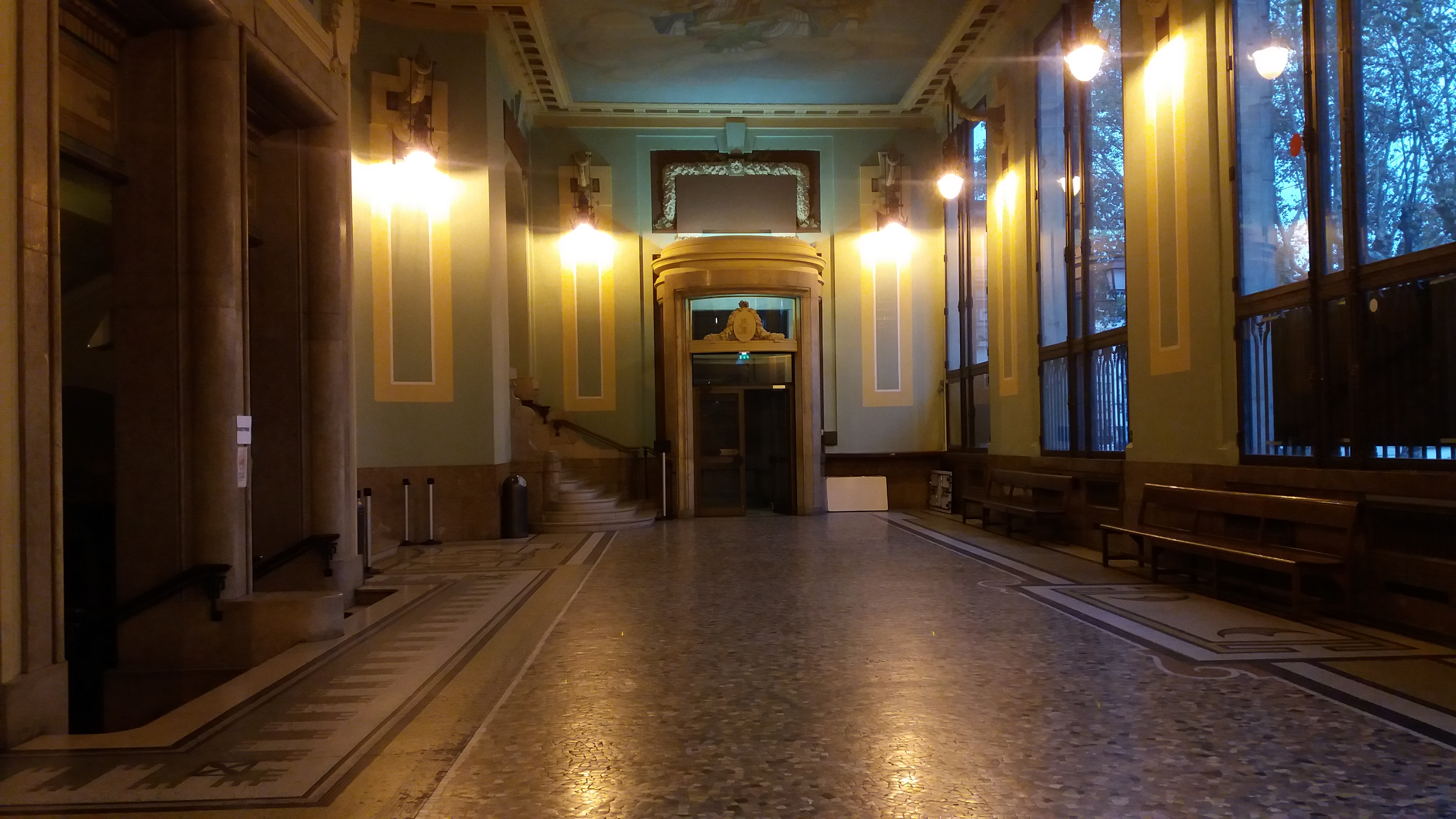 Hall du palais Bondy à Lyon.